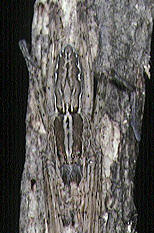 female Hygropoda higenaga from Okinawa.